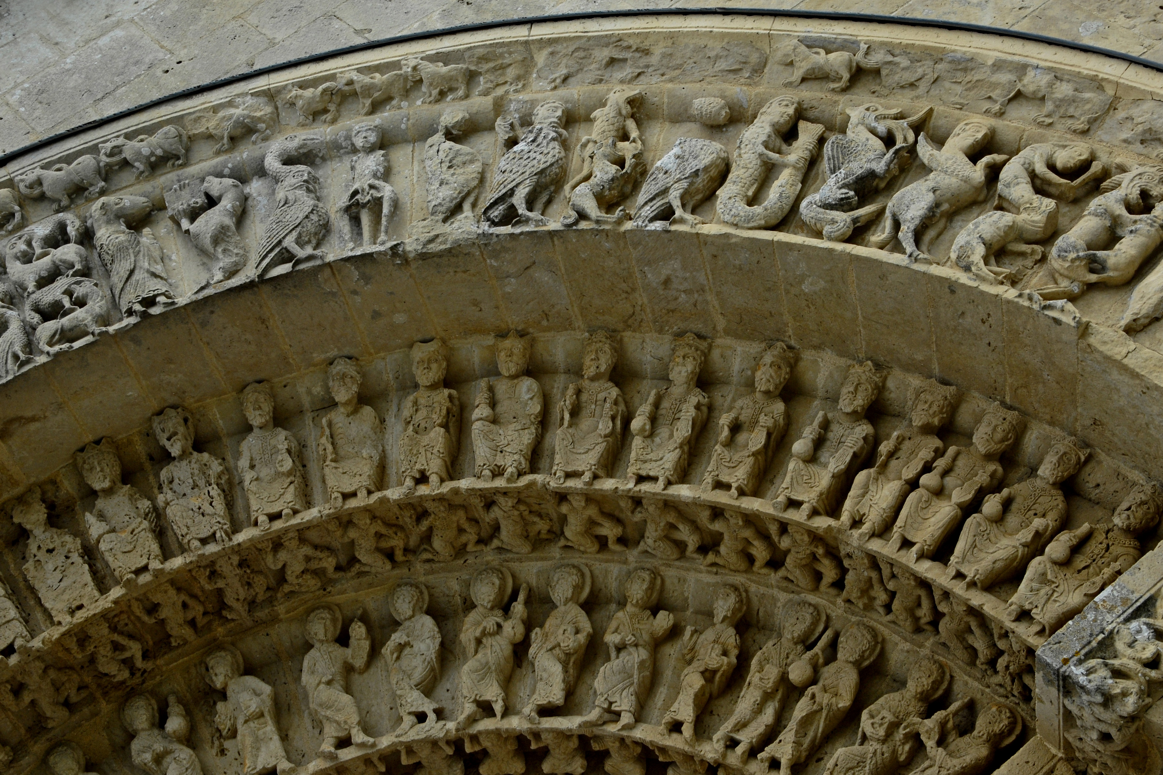 St.-Pierre Aulnay, Südportal, 2.-4. Bogen, Stirnseiten, im Scheitel, halbrechts Melusine